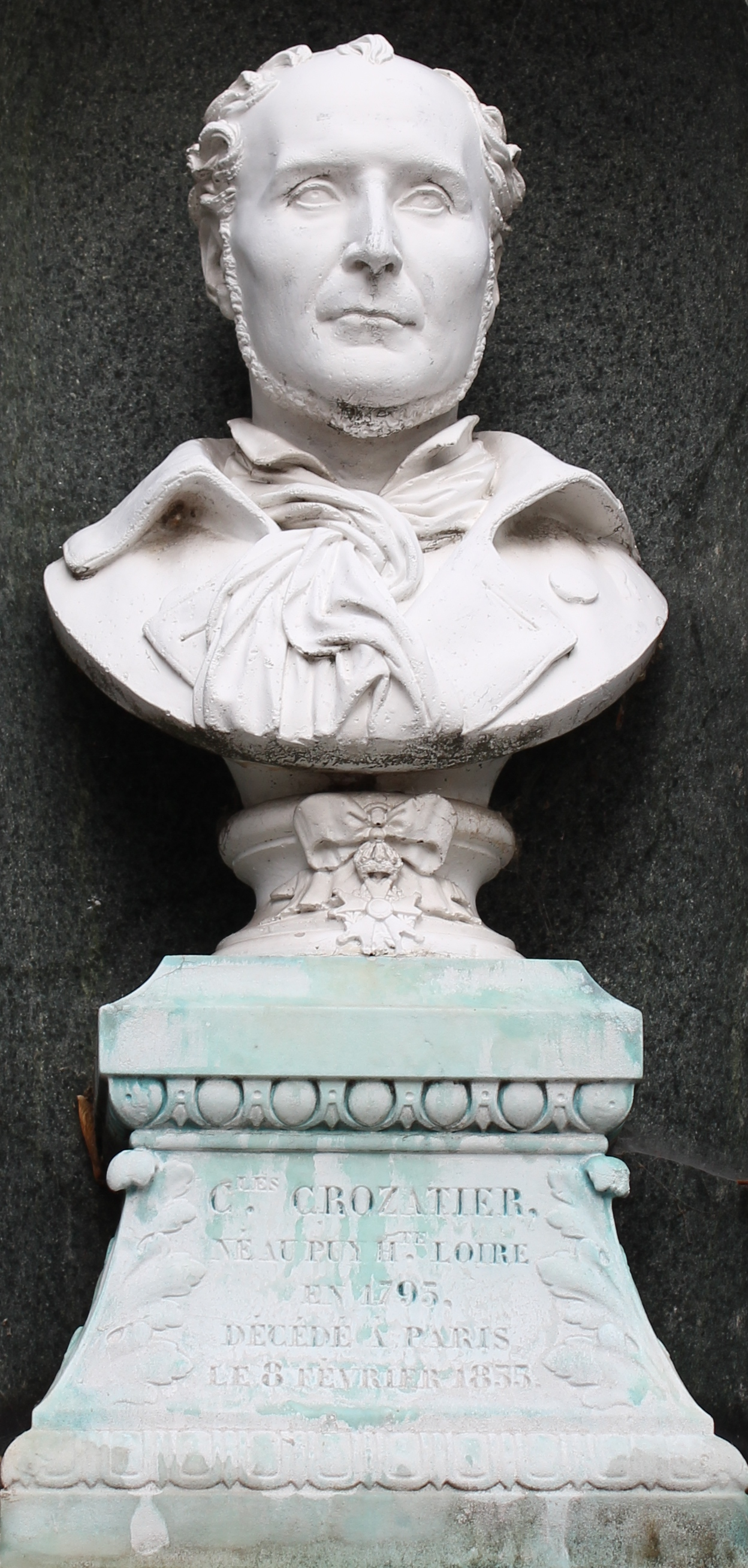 Sépulture de Charles Crozatier (1795-1855), bronzier d'art, fondeur et mécène français. Tombe ornée, à l'origine, de deux bustes et de trois bas-reliefs.